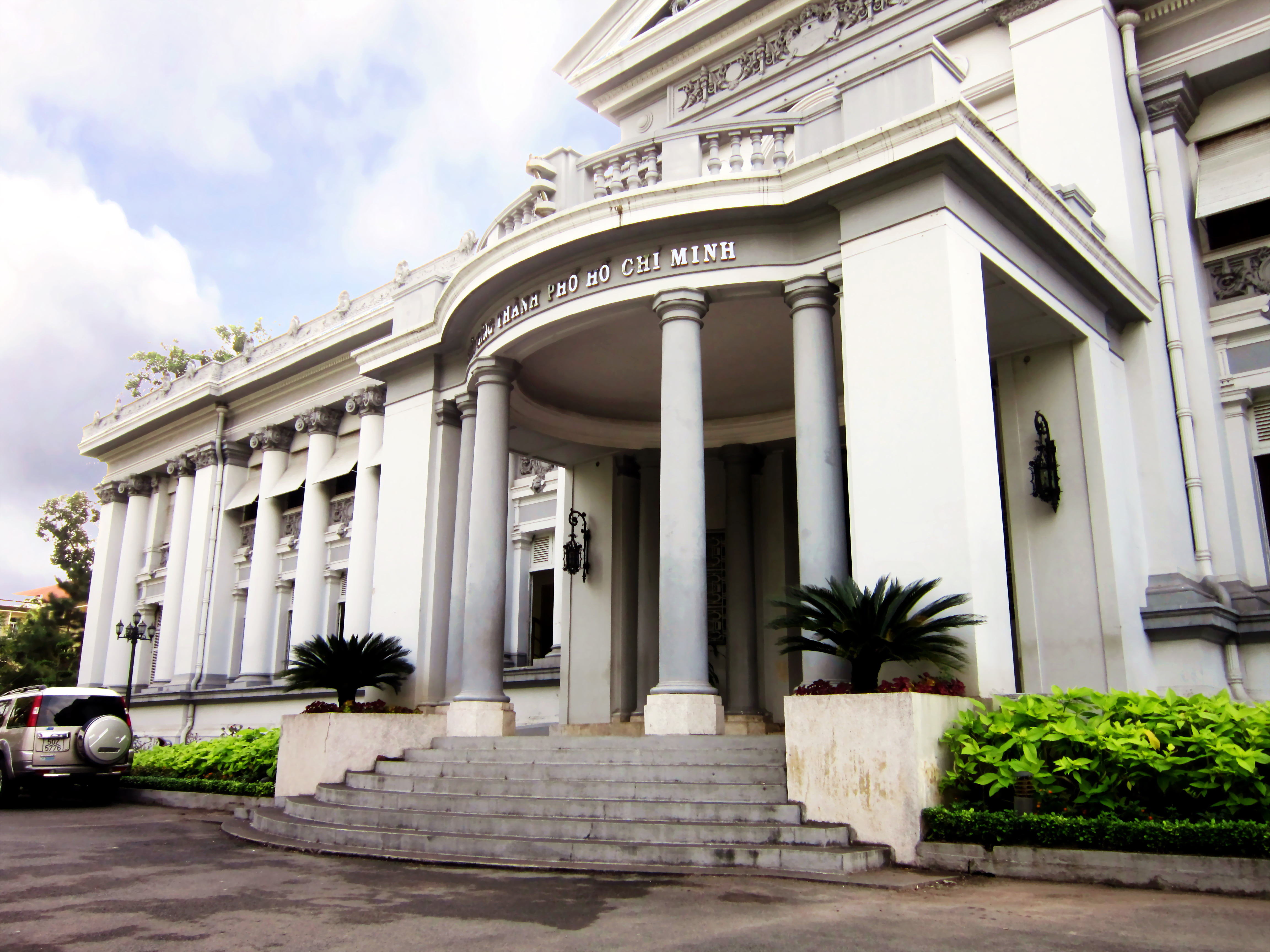 Bảo tàng Thành phố Hồ Chí Minh, Việt Nam.